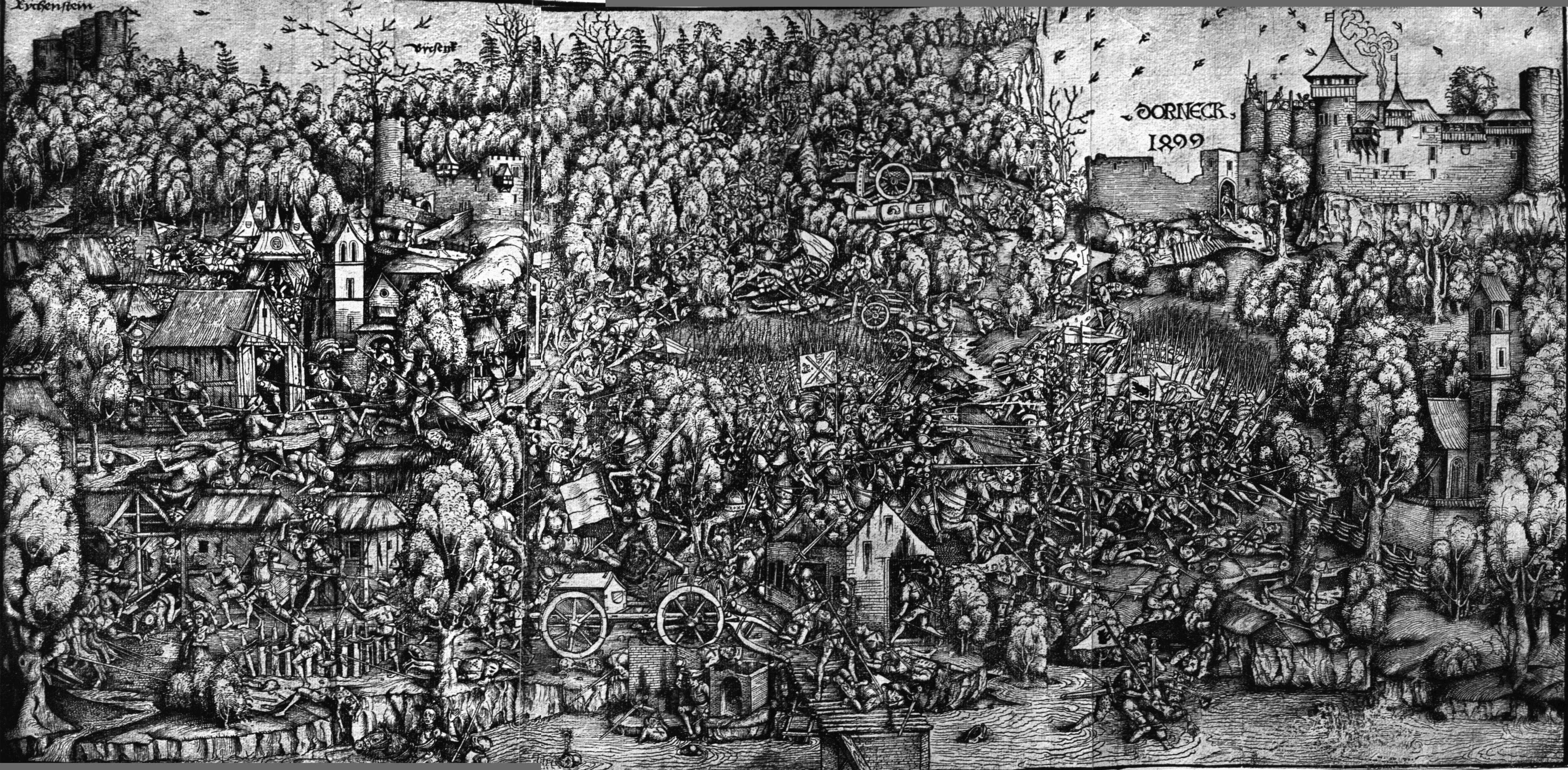 Die Schlacht bei Dornach; nach einem Holzschnitt eines unbekanntem Meister, Berlin, Kupferstichkabinet (vor 1915). Im Vordergrund die Birs, links oben Dorf und Burg Birseck, rechts Kirche und Dorf Dornach. In der Mitte sprengen die Panzerreiter Maximilians (Andreaskreuz) auf das schweizerische Fußvolk (Berner Bär). Oberhalb steht das kaiserliche Geschütz, welches Dornach unter Beschuss genommen hatte. Im Hintergrund bricht das Schweizer Ersatzheer (Schweizer Kreuz) hervor. Beim Dorf Birseck das Lager des Grafen Heinrich von Fürstenberg.